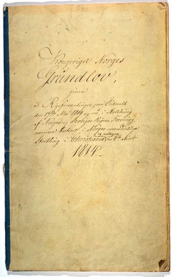 Forsiden til den håndskrevne originalutgaven av Norges grunnlov av 4. november 1814, som befinner seg i Stortingsarkivet, nr. 3 i Stortingets Indre arkiv.